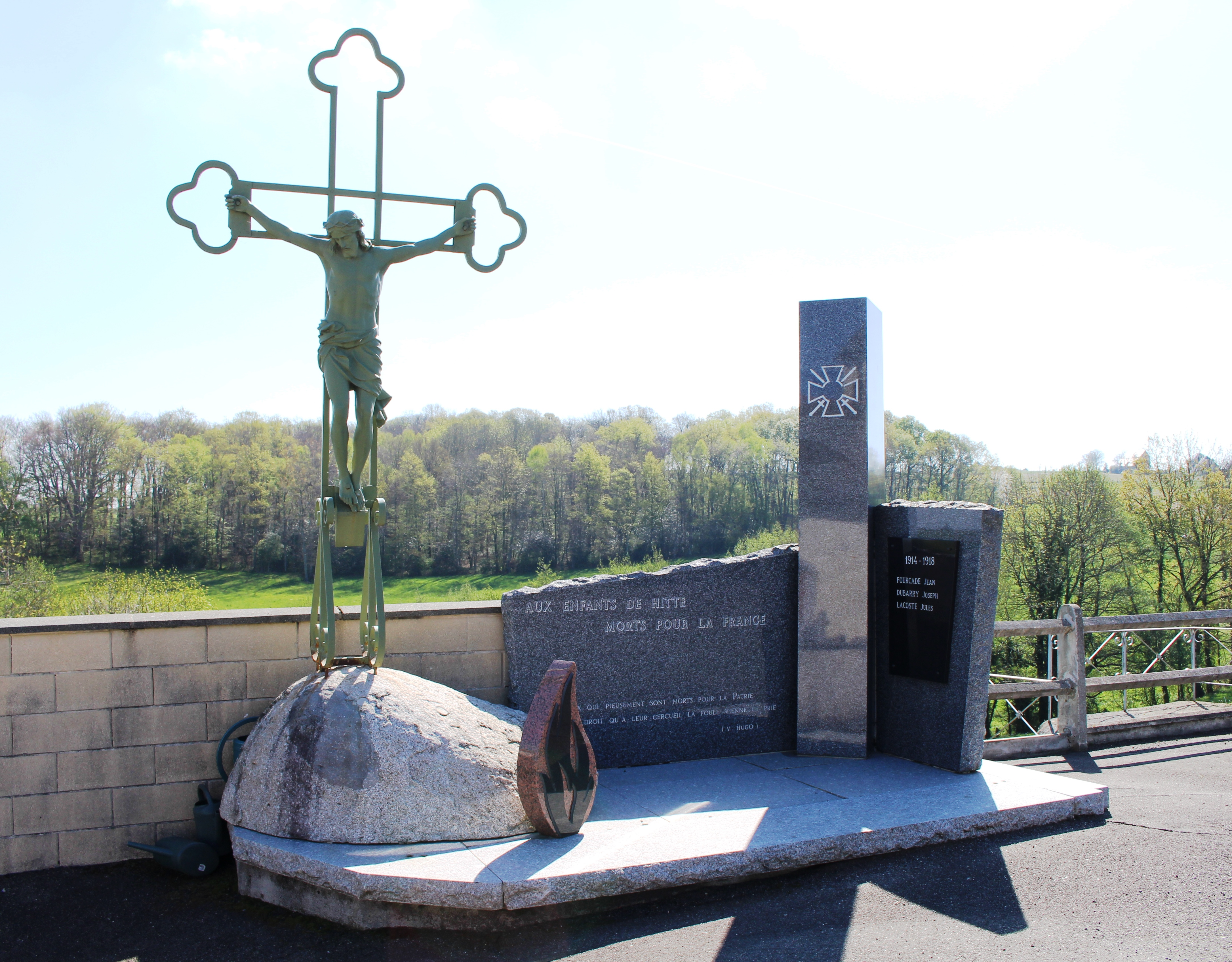 Monument aux morts de Hitte (Hautes-Pyrénées)